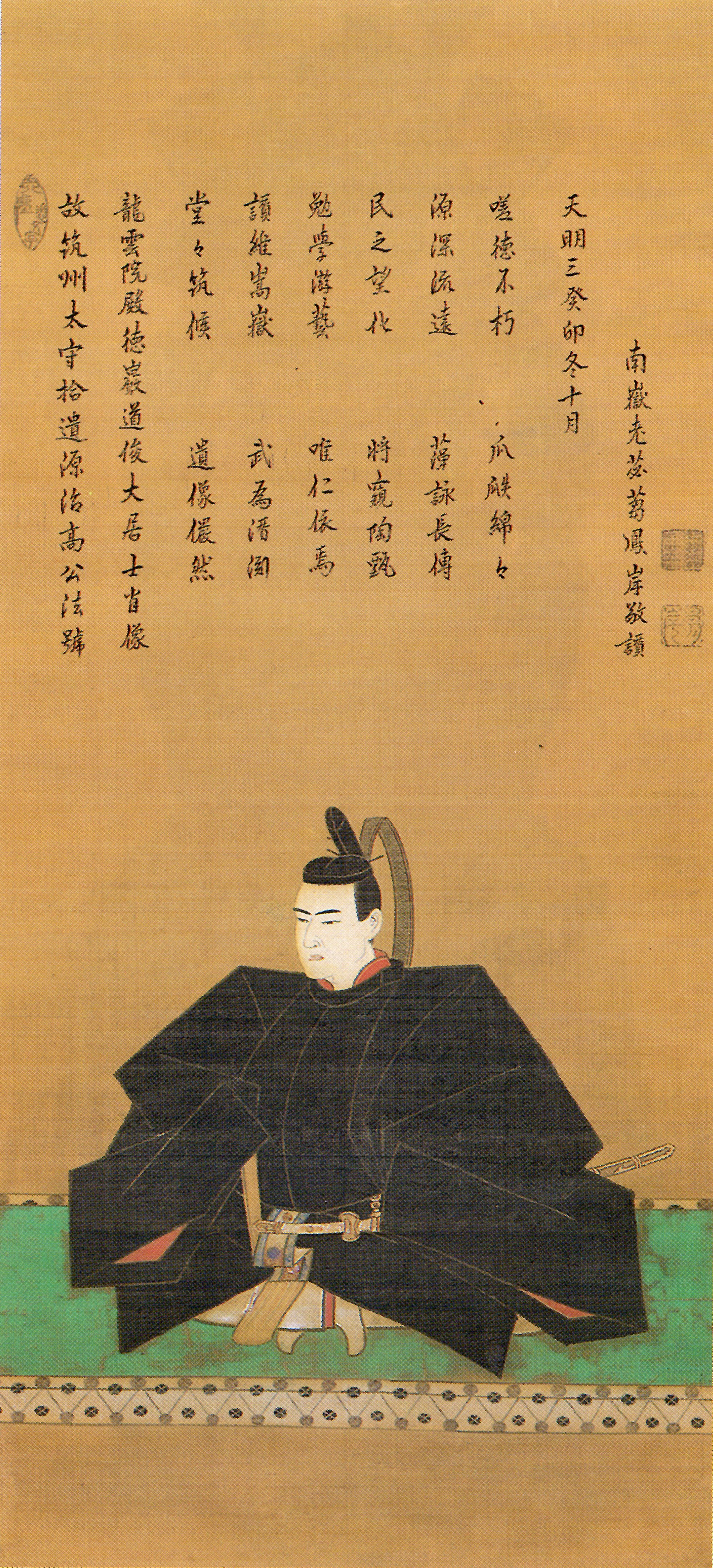 黒田治高の肖像。